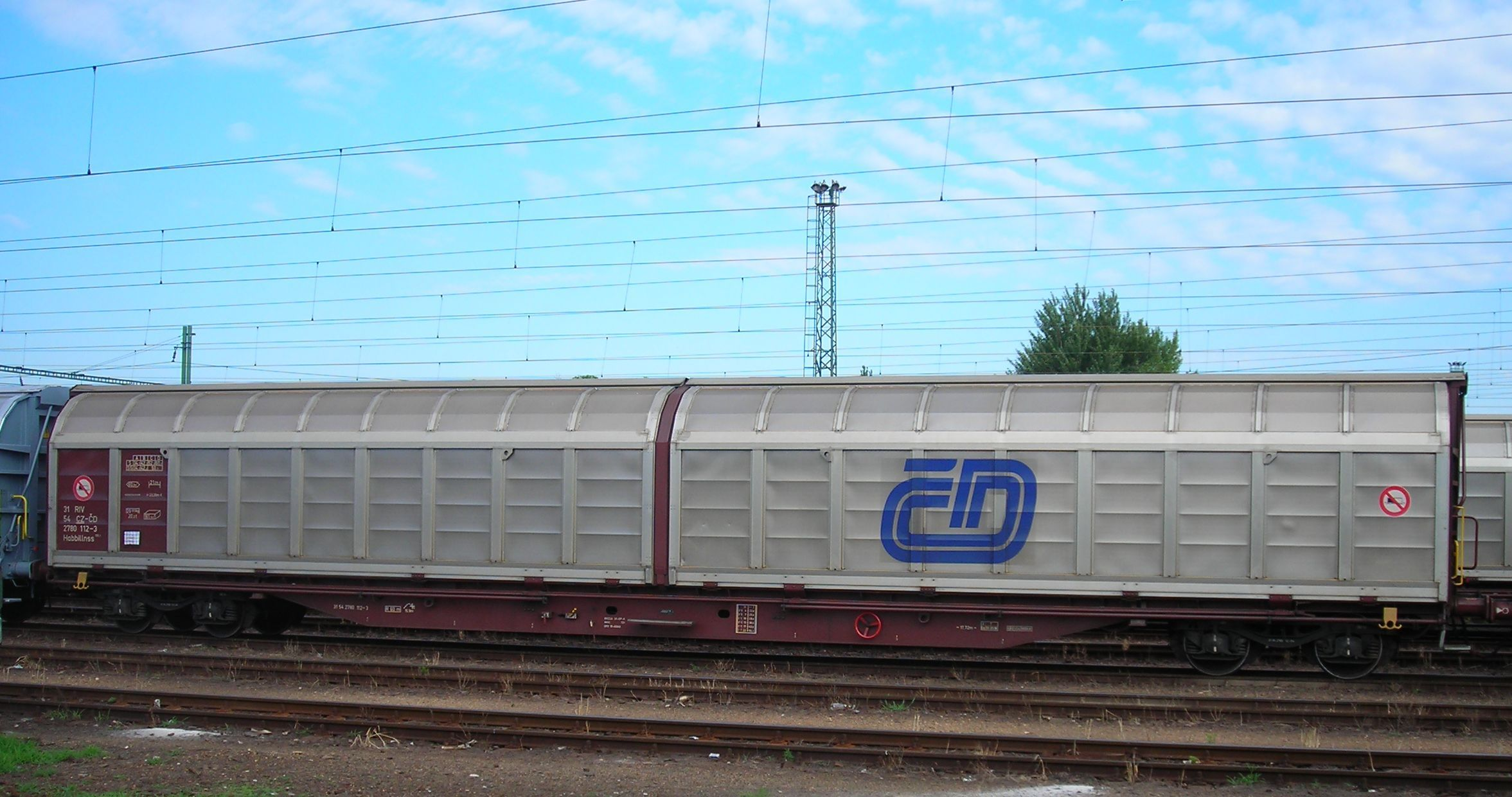 A České Dráhy Habbillnss fősorozatú eltolható oldalfalú tehervagonja Szolnokon.